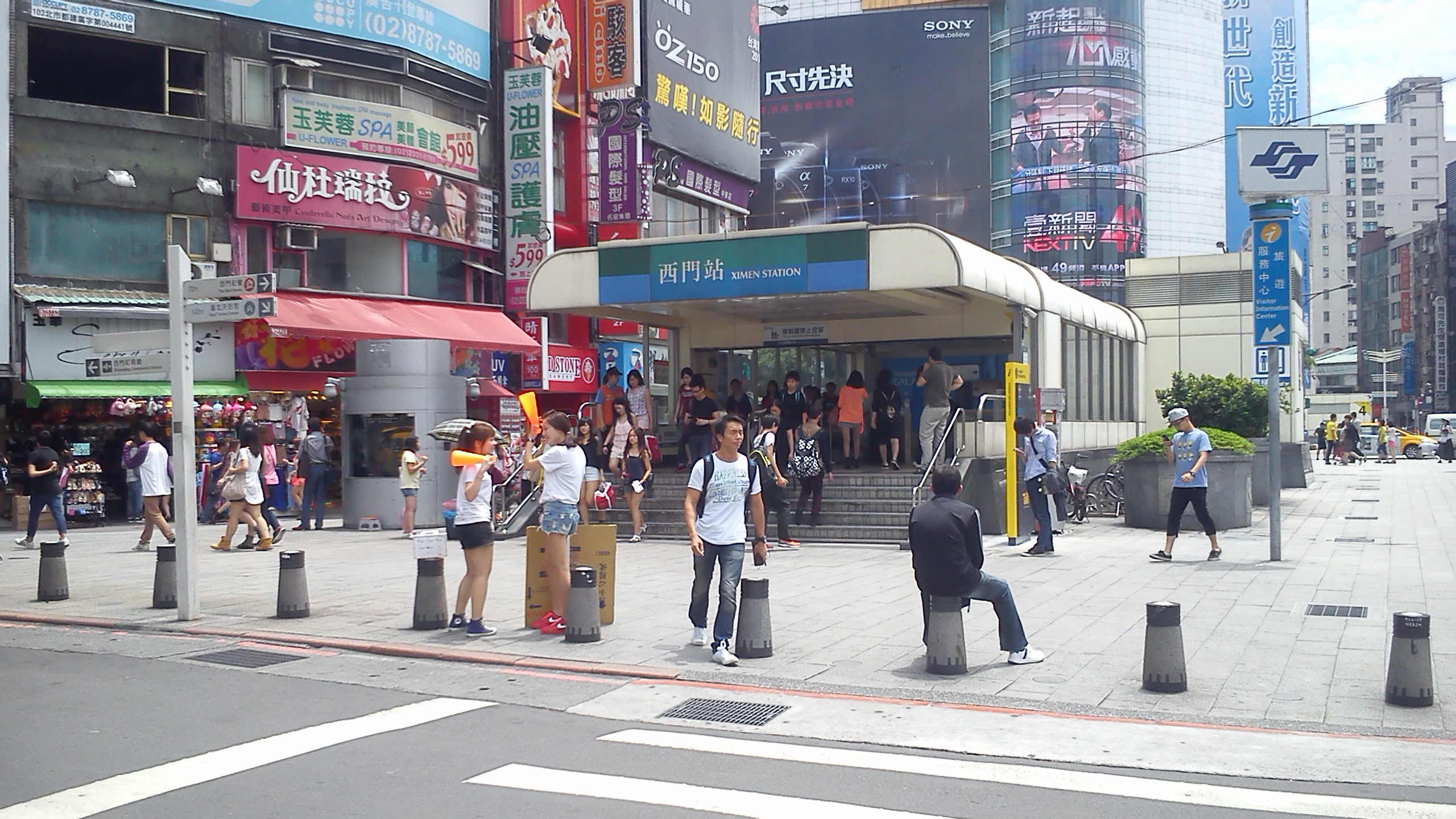 臺北捷運西門站六號出口。